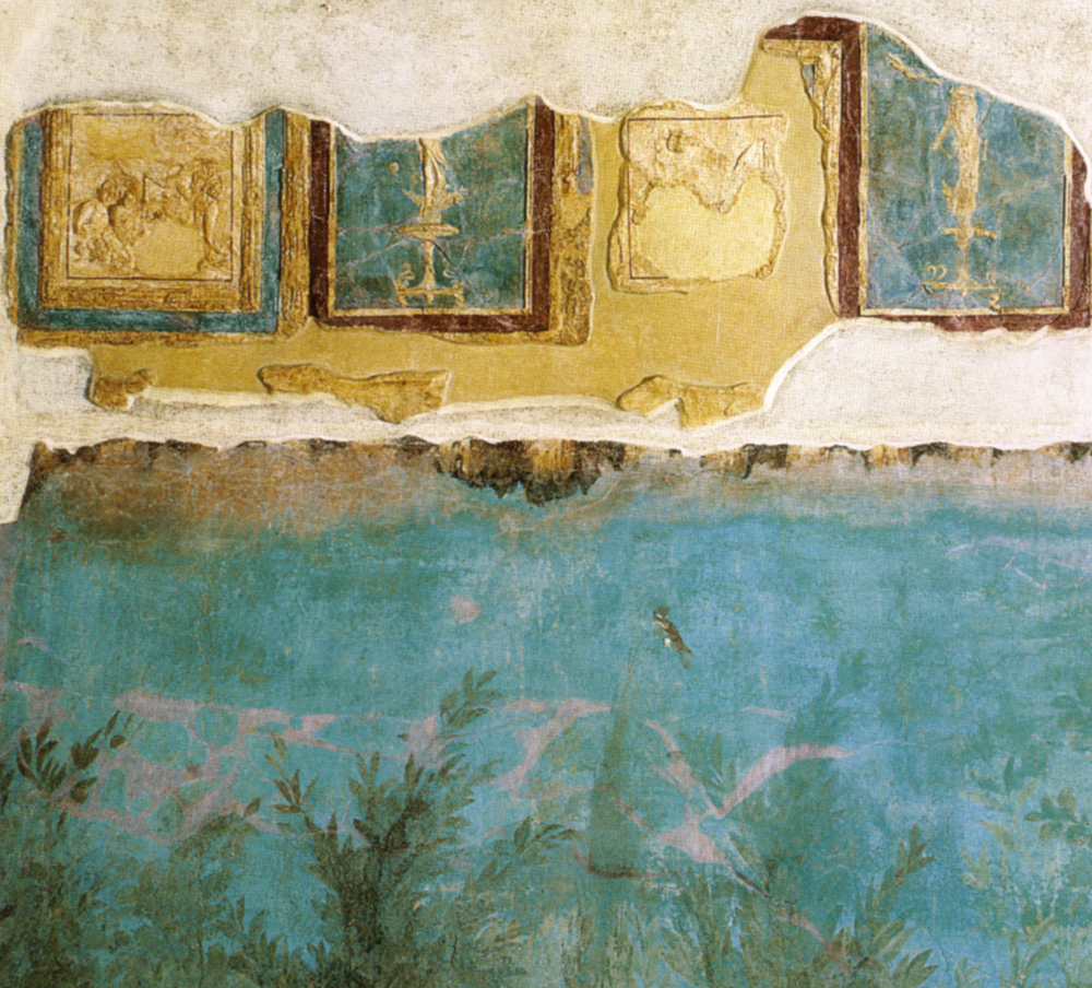 Villa di livia, affreschi di giardino, dettaglio degli stucchi sulla parete orientale